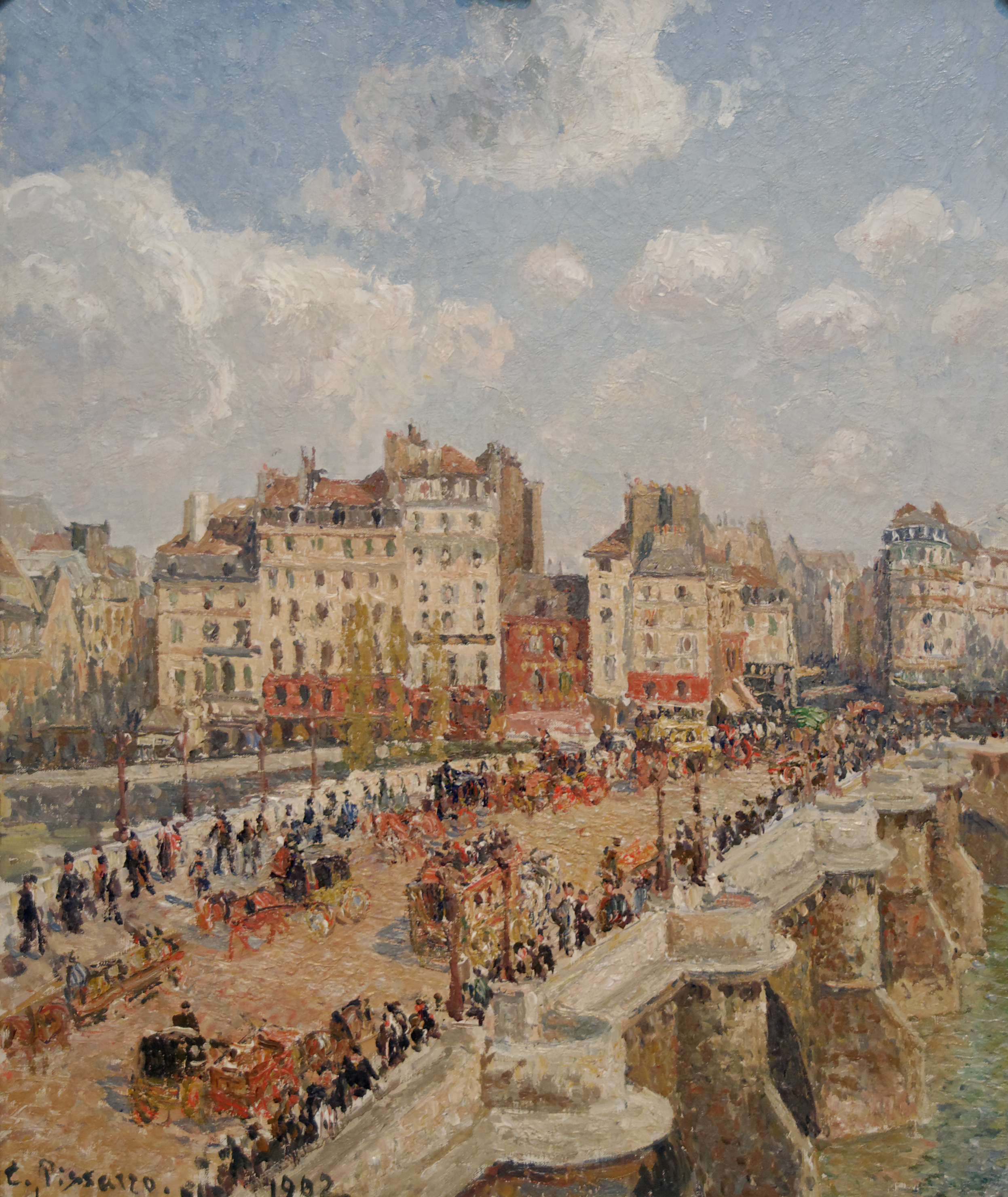 Le Pont-Neuf. Huile sur toile (1902) de Camille Pissaro (1830-1903). Exposé au musée des beaux-arts de Budapest